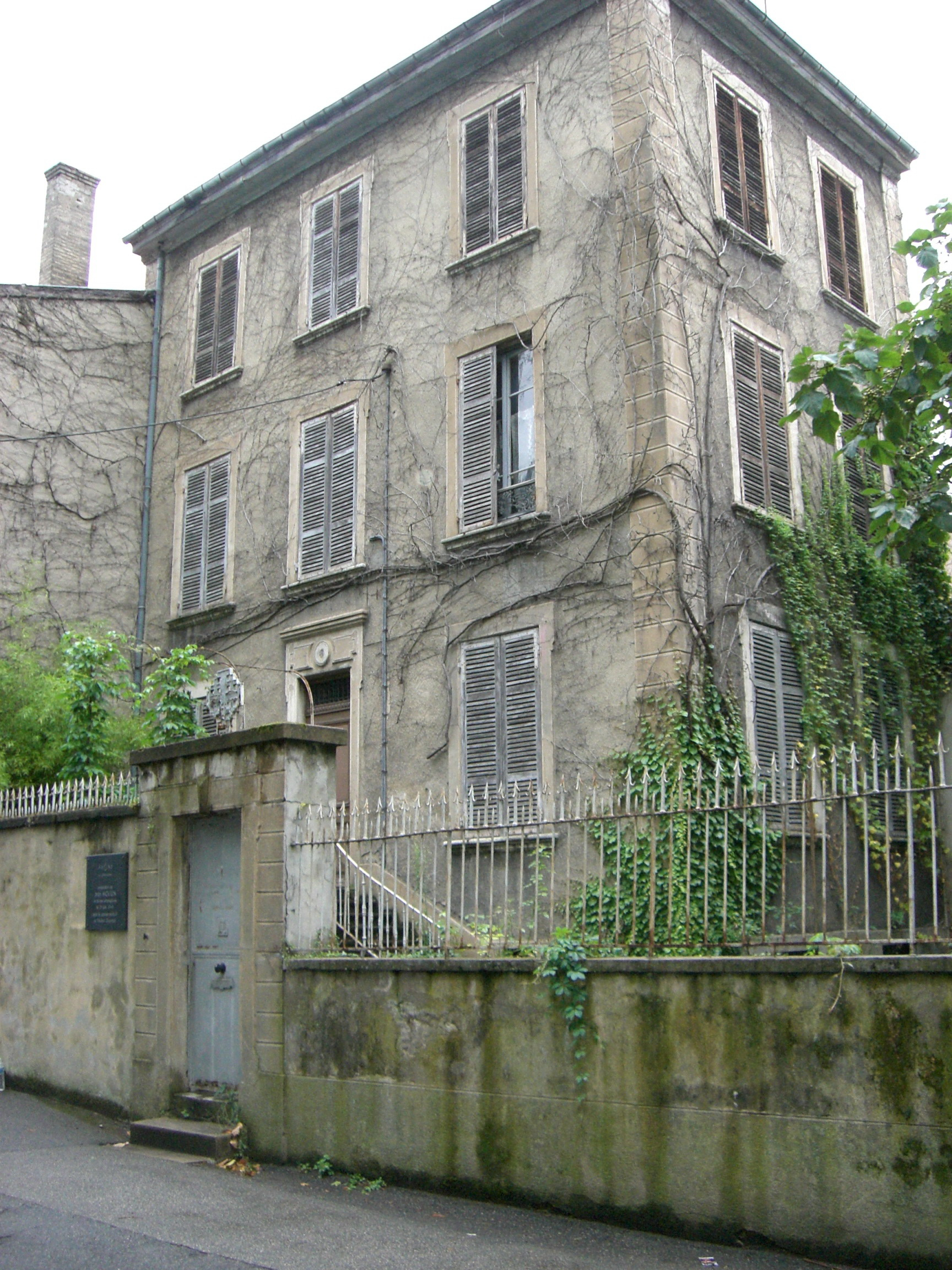 Photo de la maison du docteur Dugoujon à Caluire-et-Cuire, celle-là même où le résistant Jean Moulin a été arrêté.